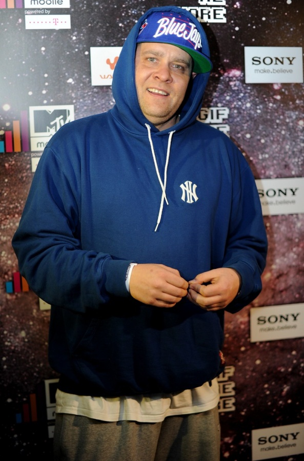 Tede podczas imprezy MTV Mobile